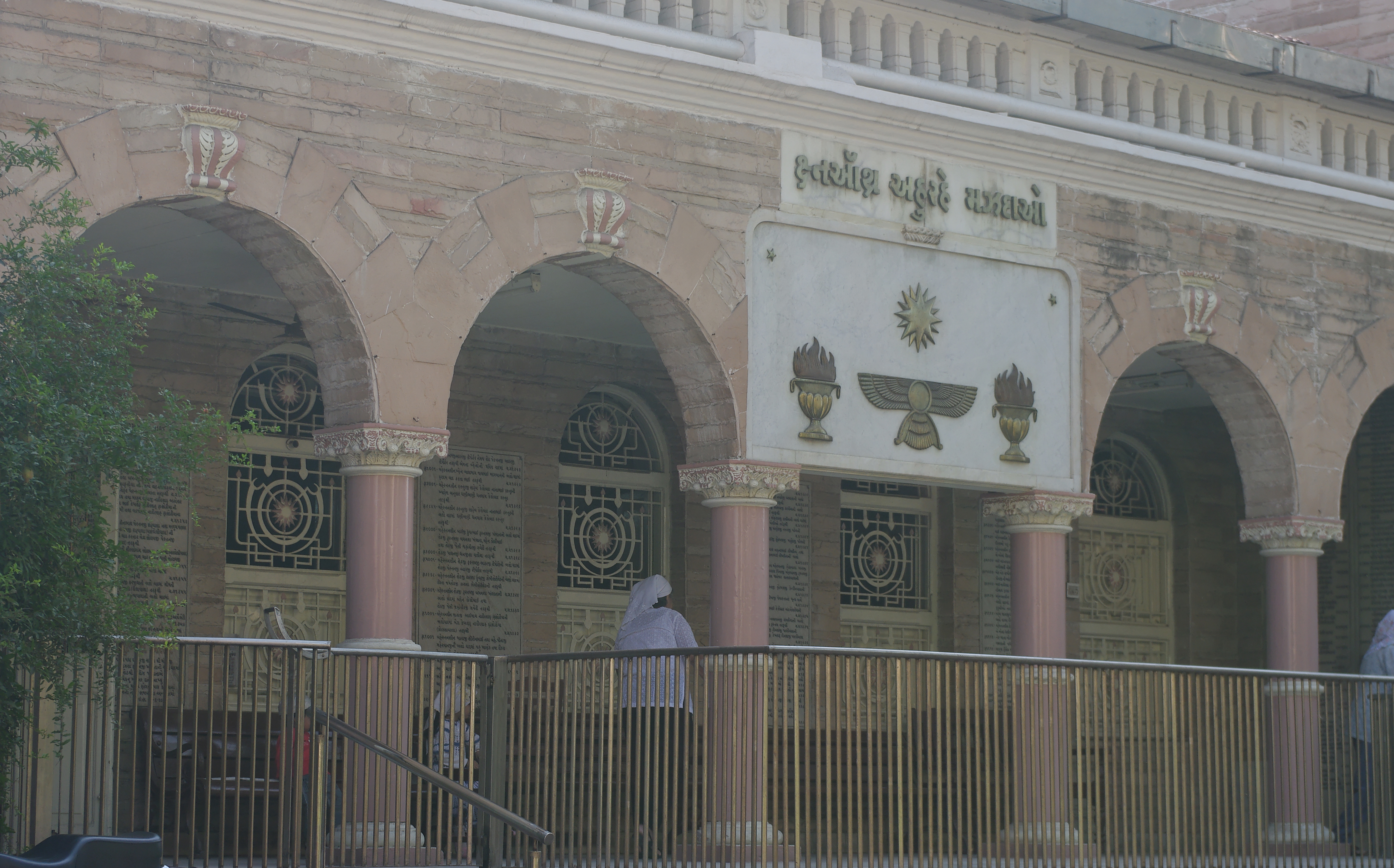 Parsi Fire Temple of Ahmedabad - Gujarat, India